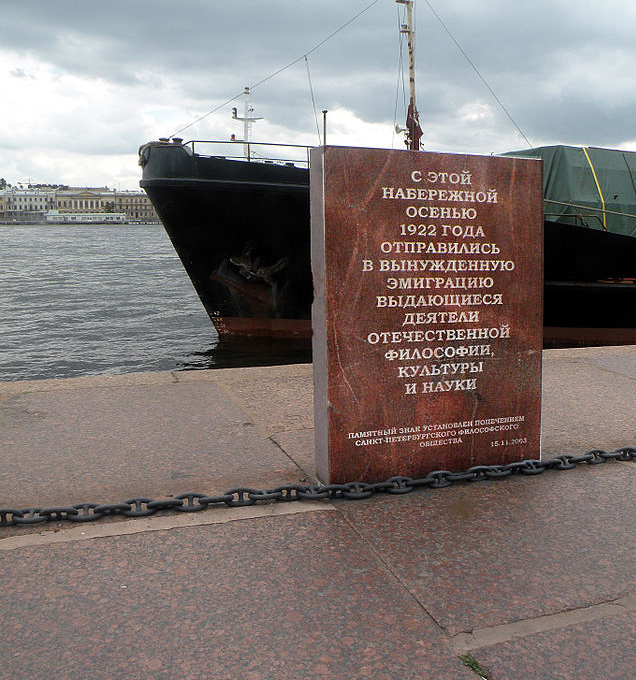 Памятный знак на месте изгнания большевиками деятелей русской науки. Петербург.